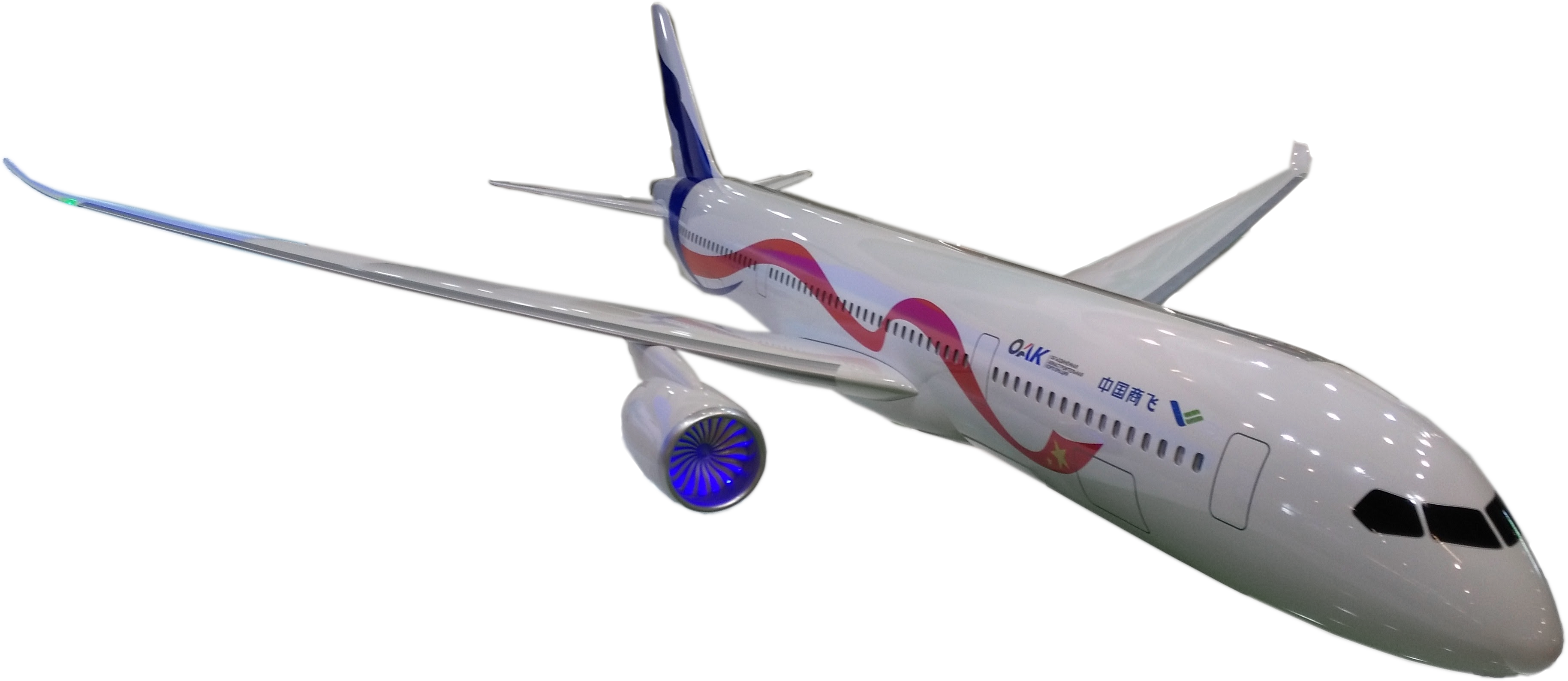 Paris Air Show 2017 Comac C929